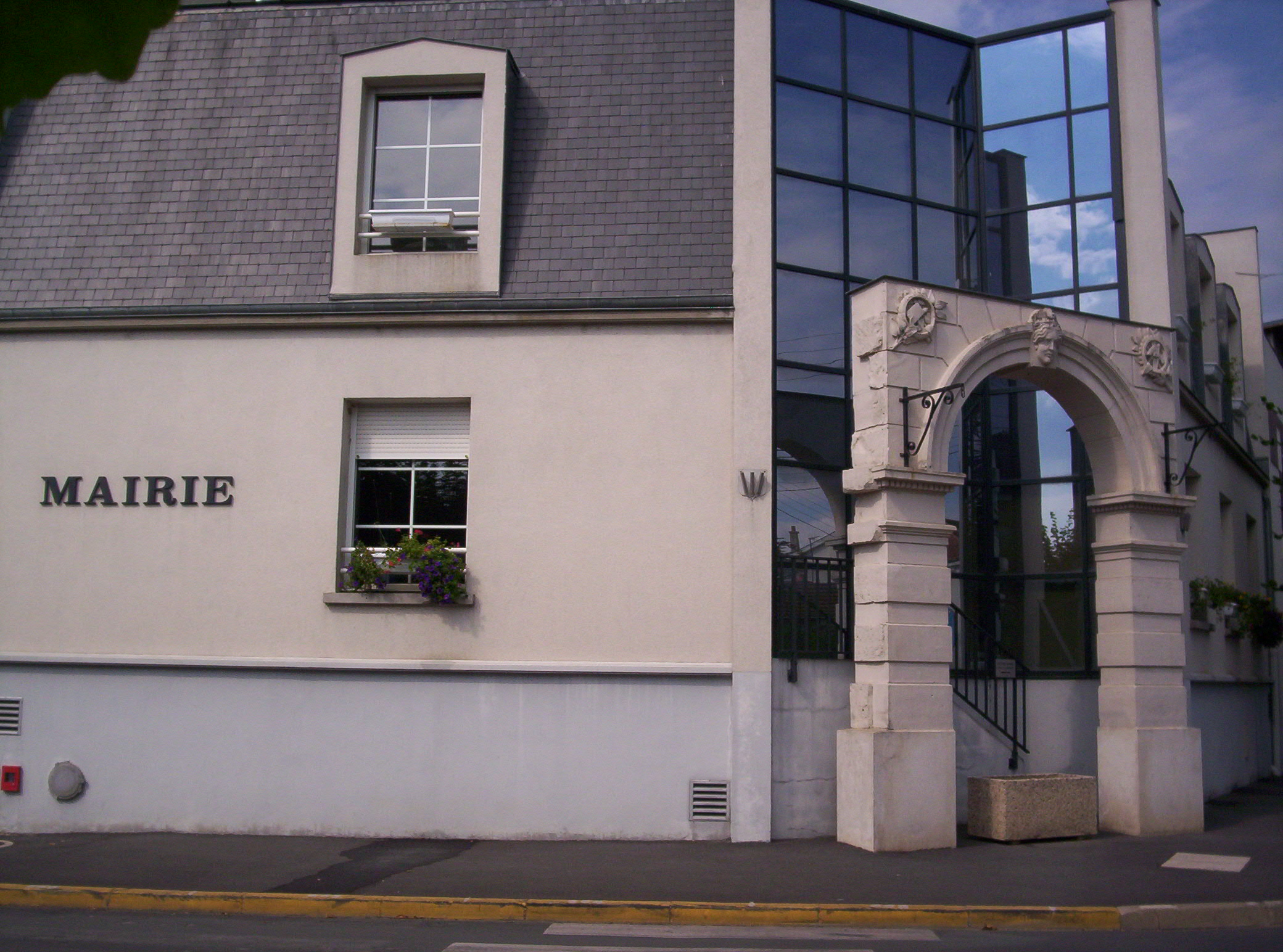 Mairie de Magenta, Marne, France.